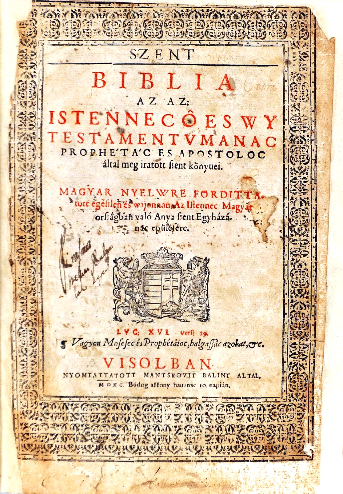 A Biblia első teljes magyar nyelvű fordítása - a Vizsolyi Biblia. Fordították: Károlyi Gáspár és társai. Vizsoly, 1590. SZENT Biblia, az az Istennec O es Wy testamentvmanac prophétác es apostoloc által meg iratott szent könyuei. Magyar nyelwre fordittatott [Károlyi Gáspár és mások által] egészben és wijonnan az Istennec Magyar országban való anya szent egyházánac épülésére. Visolban MDXC Mantskovit